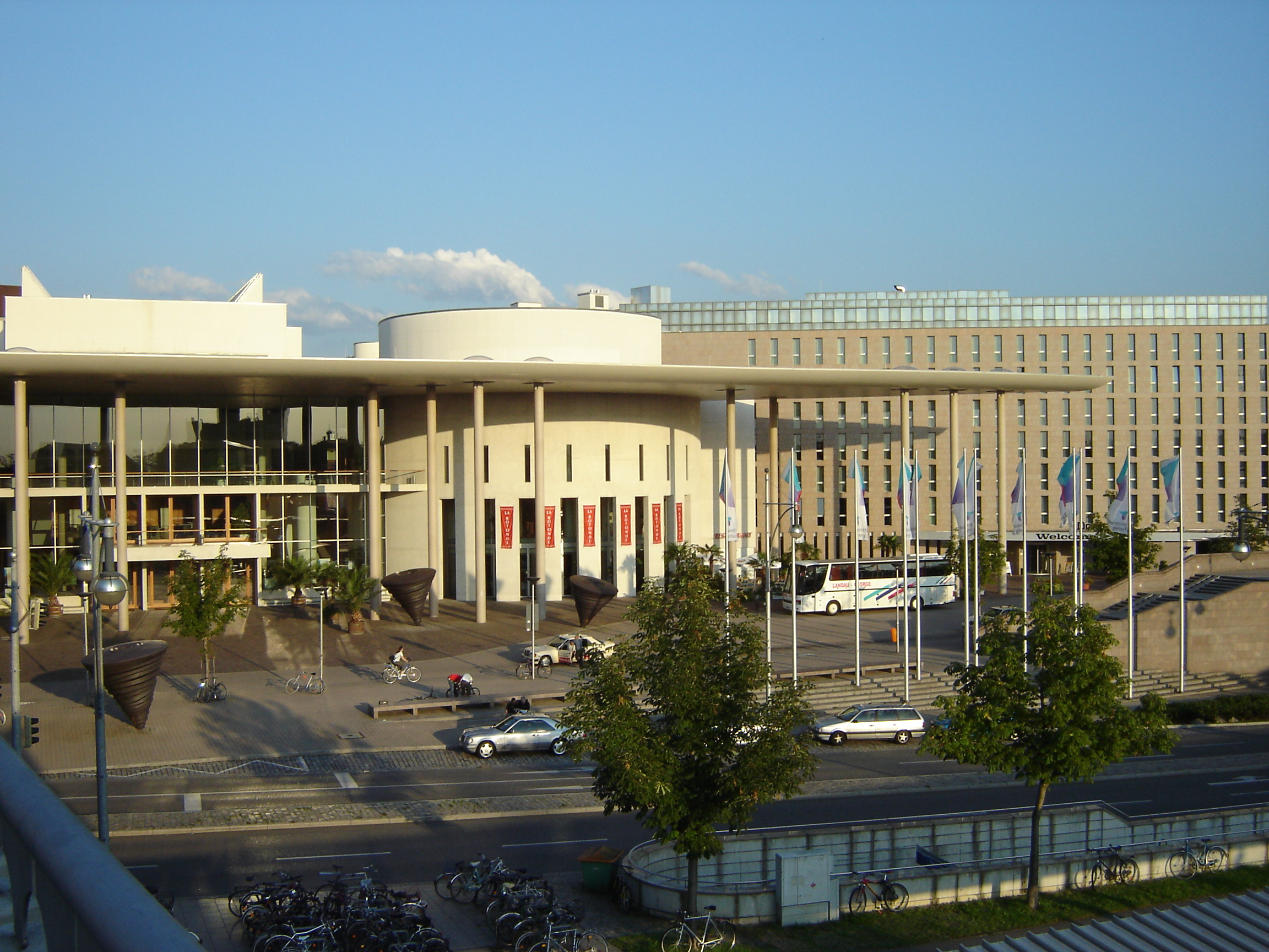 Konzerthaus Freiburg, Germany